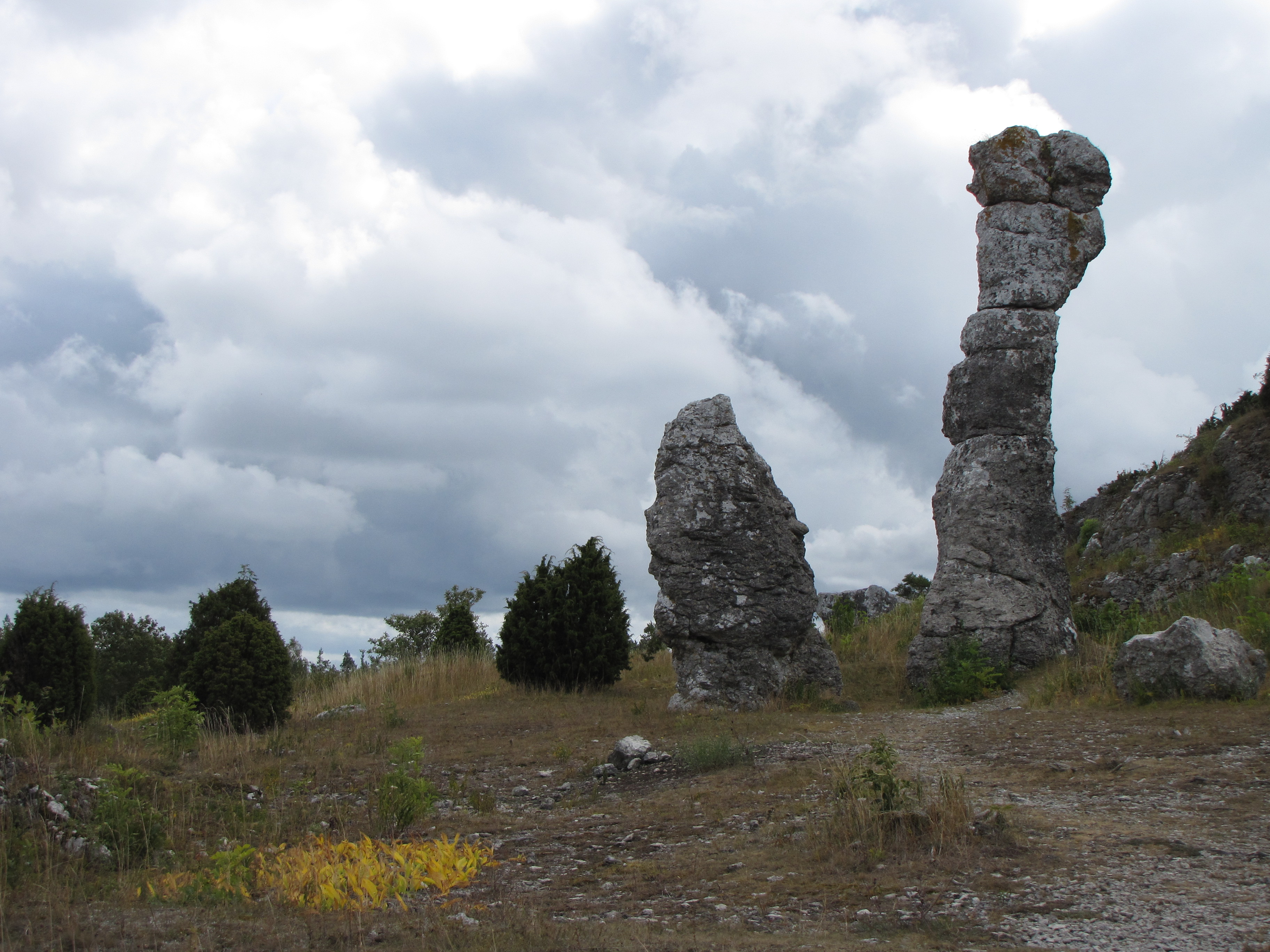 Raukar på Klinteklinten på nordöstra Gotland.